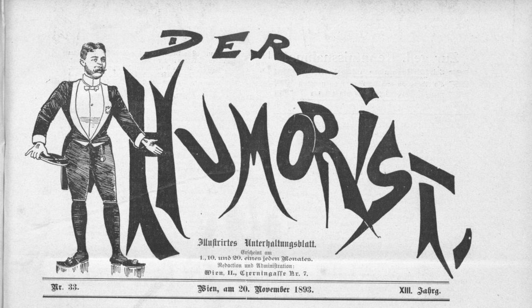 Der Humorist Kopf 1893